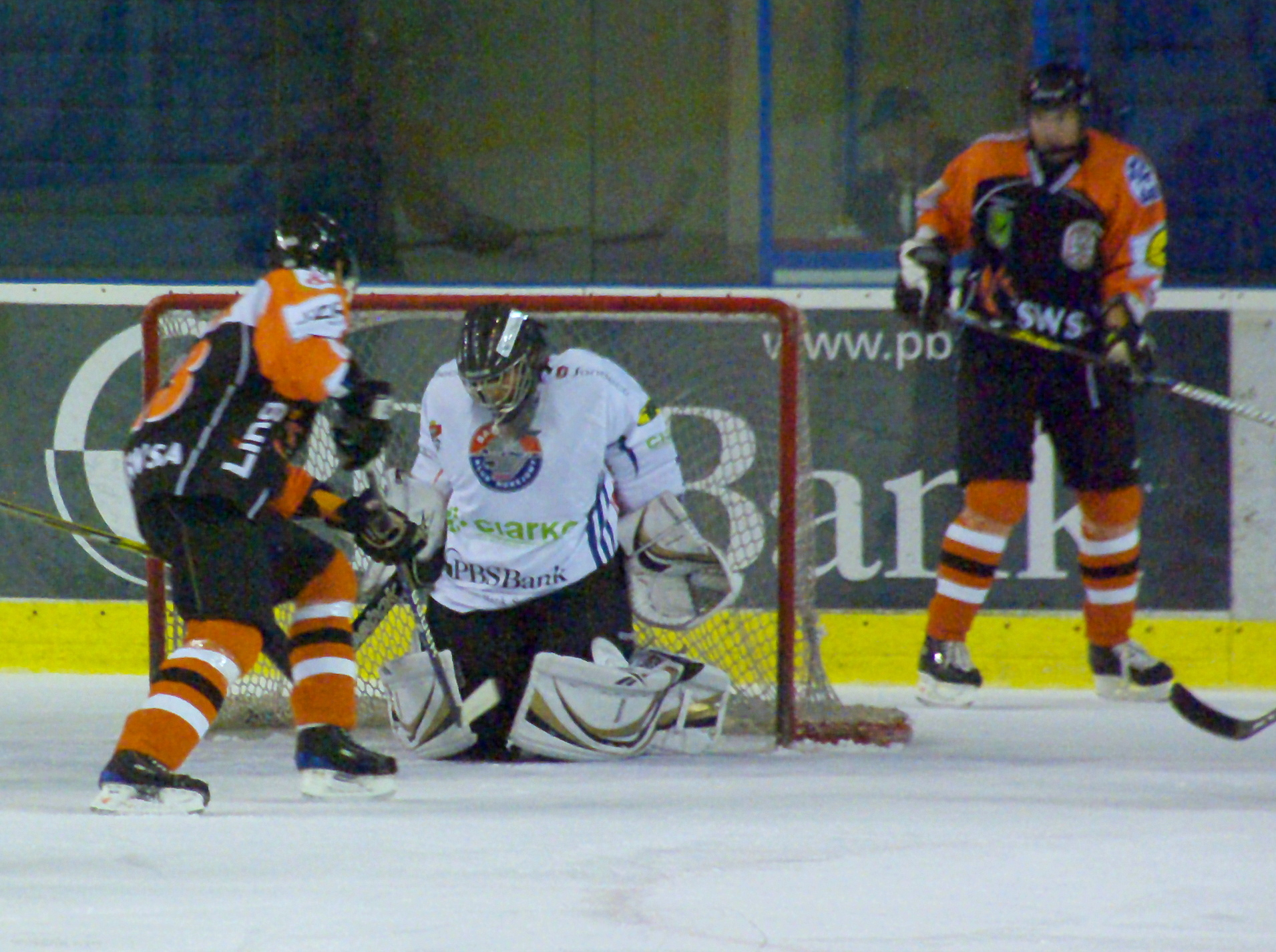 Mecz KH Sanok - JKH GKS Jastrzębie (3:2 k.) 19 września 2010, Arena Sanok. Petr Lipina, Richard Král, Michał Plaskiewicz.